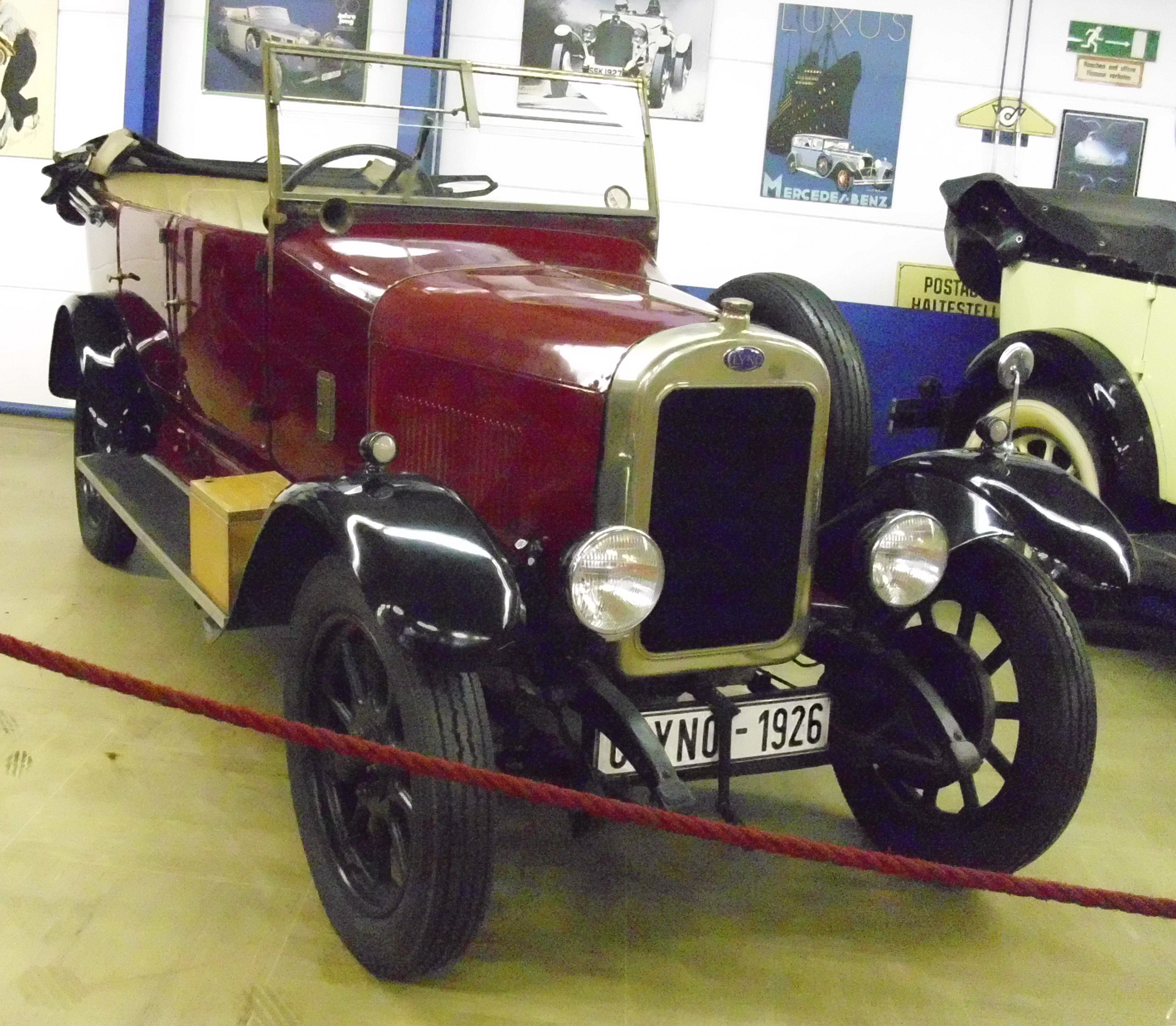 Clyno 10.8 HP 1926 im Oldtimer-Museum Kröpfl